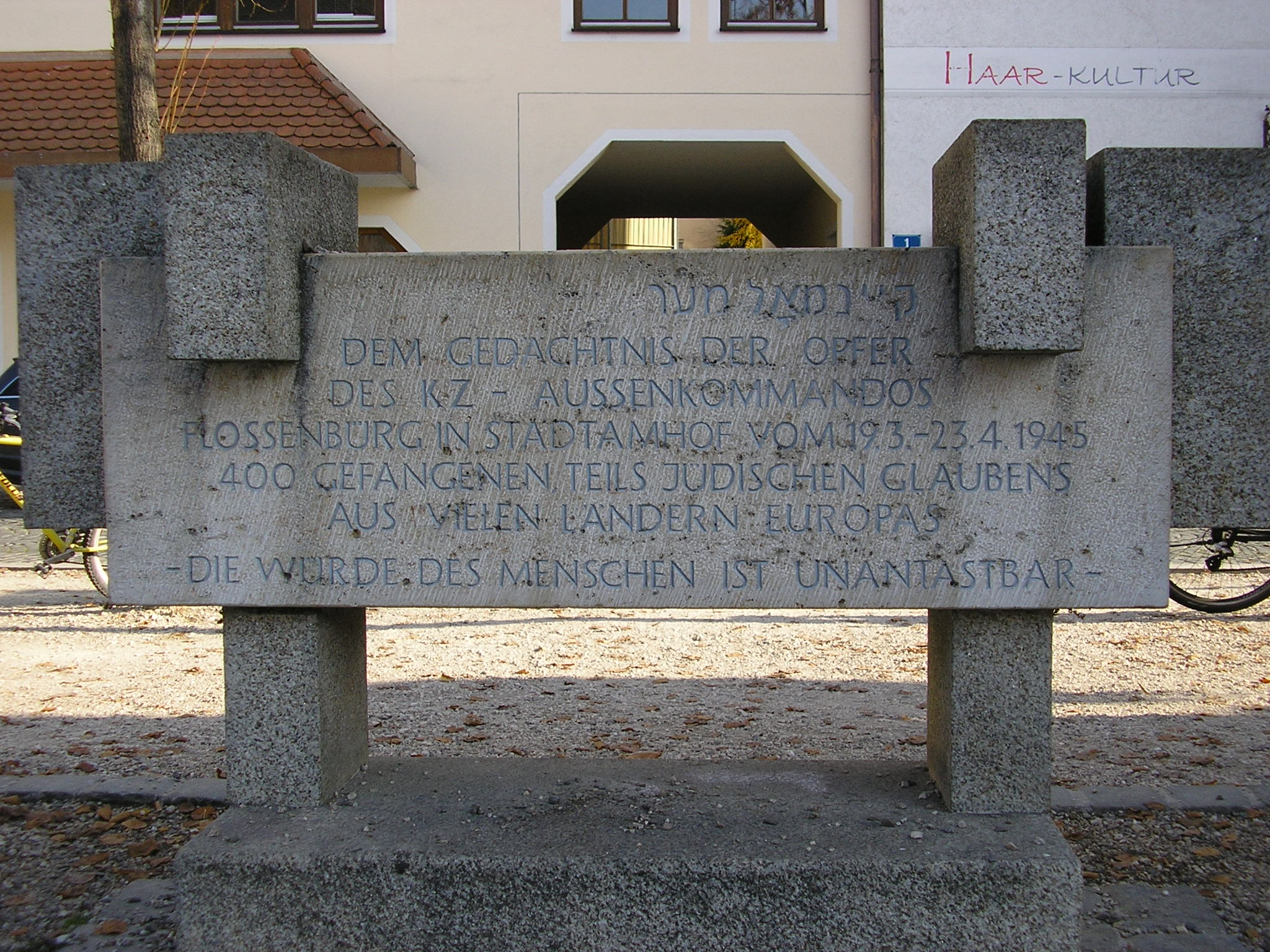 Gedenkstein in Stadtamhof (Regensburg, Deutschland)zu KZ-Aussenkommando Flossenbürg von 1994